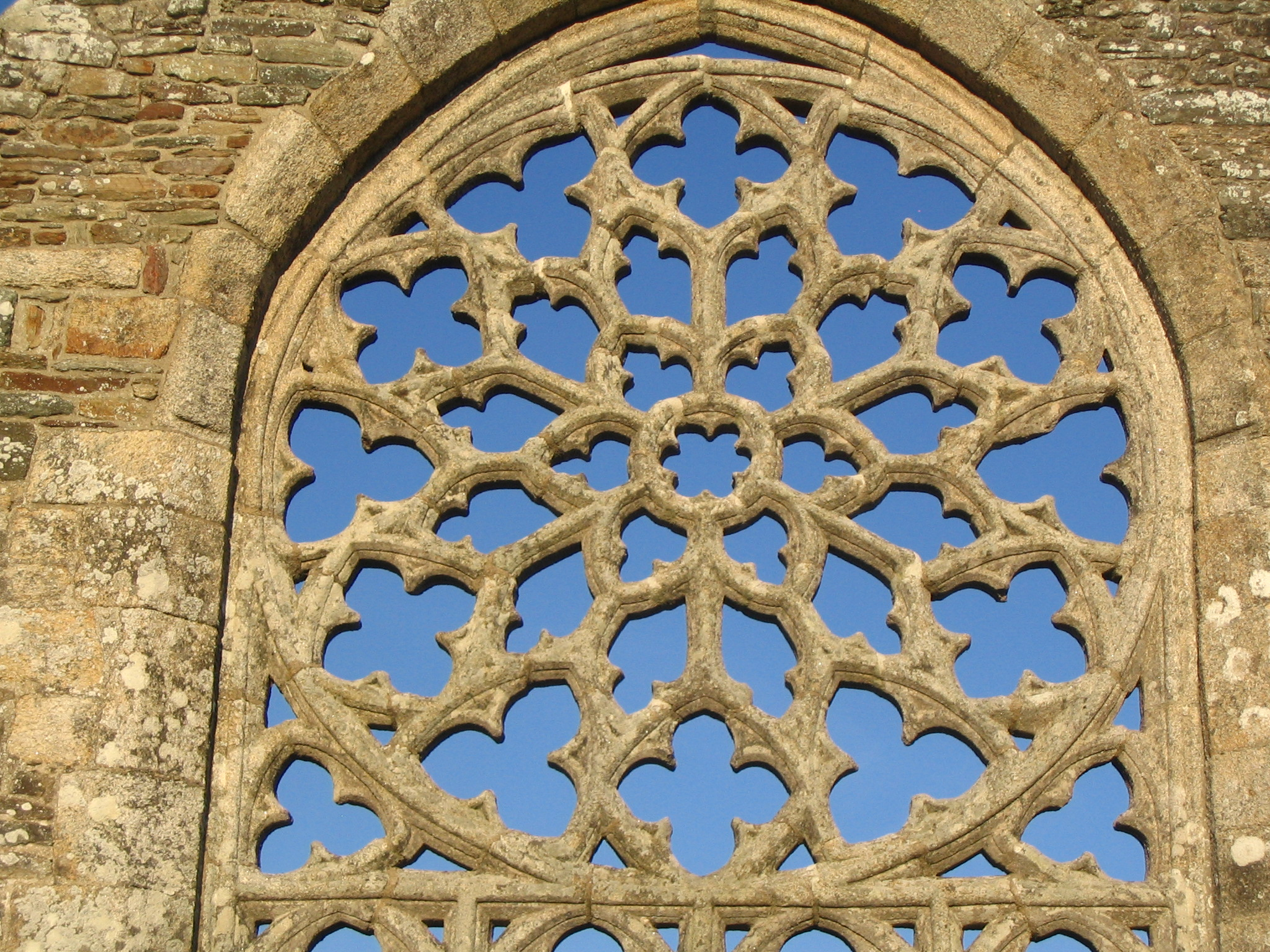 Plovan - Finistère - France - Ruines de la Chapelle de Languidou- Détail de la Rosace